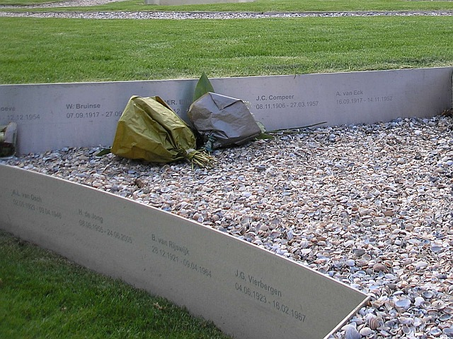 Tuin van Bezinning; Eerbetoon aan overleden politiemensen op RVS borders. Nationaal monument ter ere van tijdens de uitoefening van de dienst overleden Nederlandse politiemensen. Locatie: Achter koetshuis van Huis 't Velde te Warnsveld (NL) Foto: Pudding4brains, 5 mei 2006 - Volledig vrijelijk te gebruiken ('Publiek Domein') Categorie:Afbeelding Tuin van Bezinning